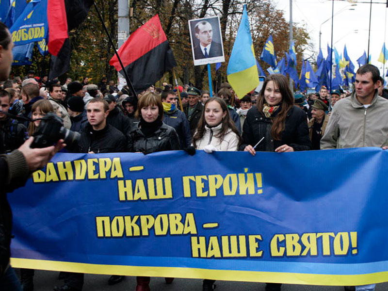 Марш УПА, Київ, 2009-10-14.